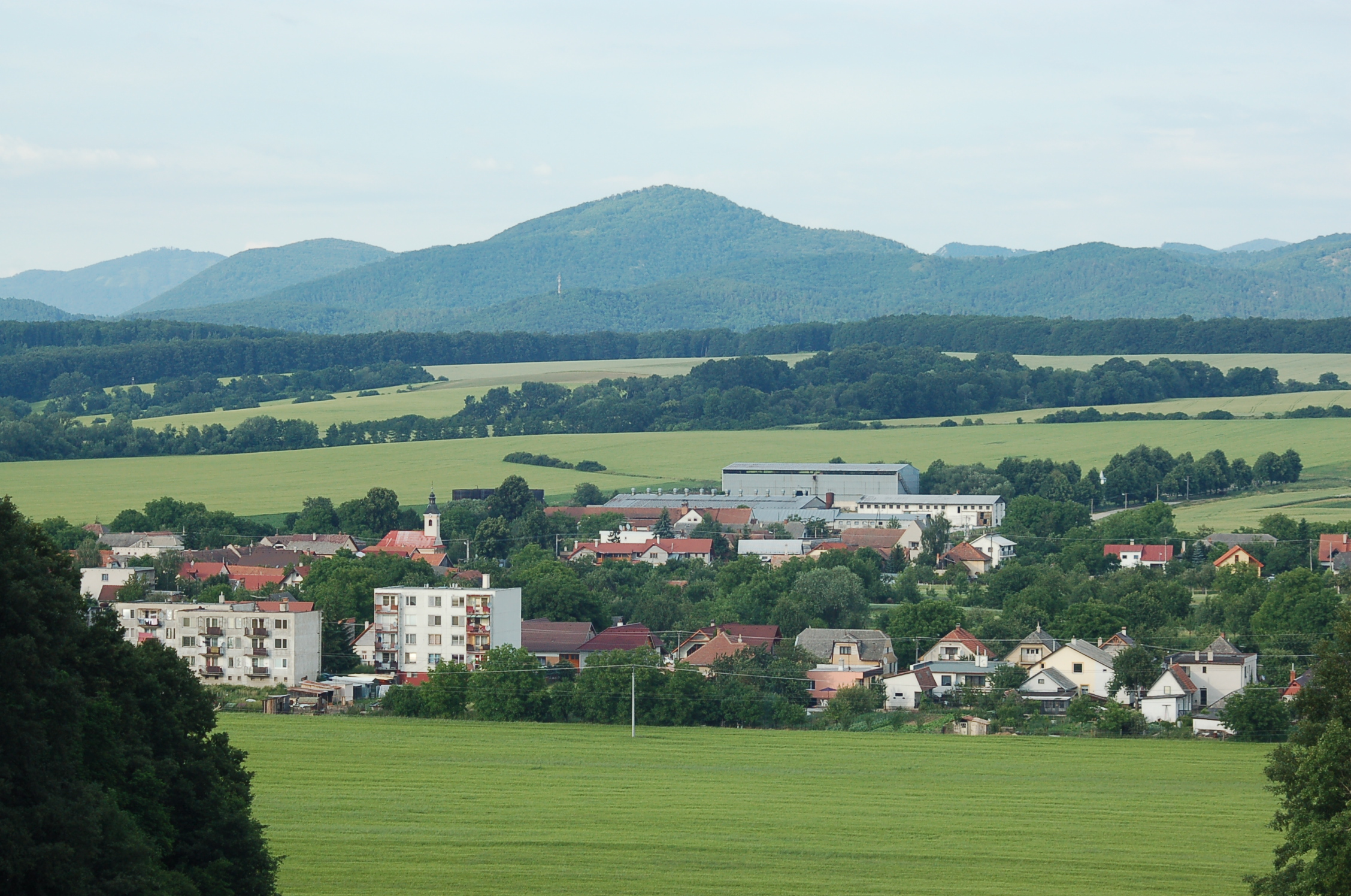 Obec Horňany